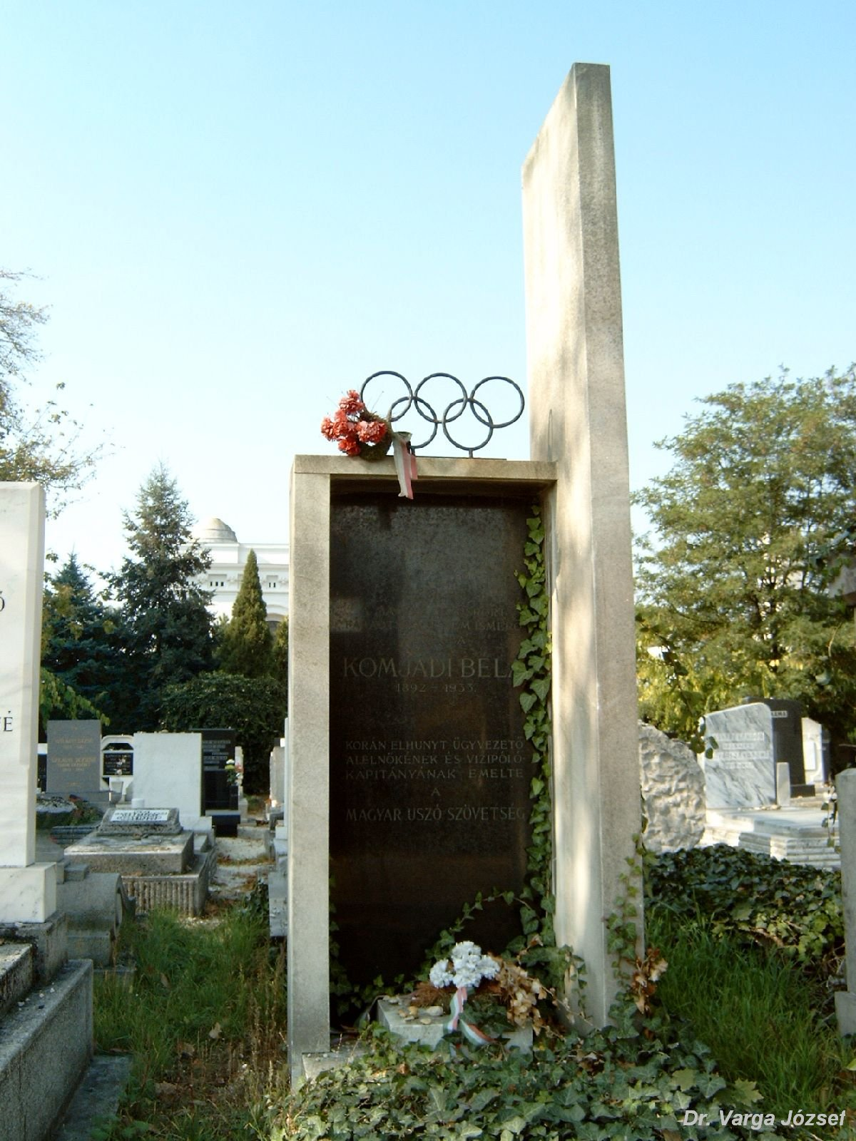 Komjádi Béla (Bp., 1892. márc. 15. – Bp., 1933. márc. 5.): magántisztviselő, sportújságíró sírja Budapesten. Kozma utcai zsidó temető: 3C-11-23.